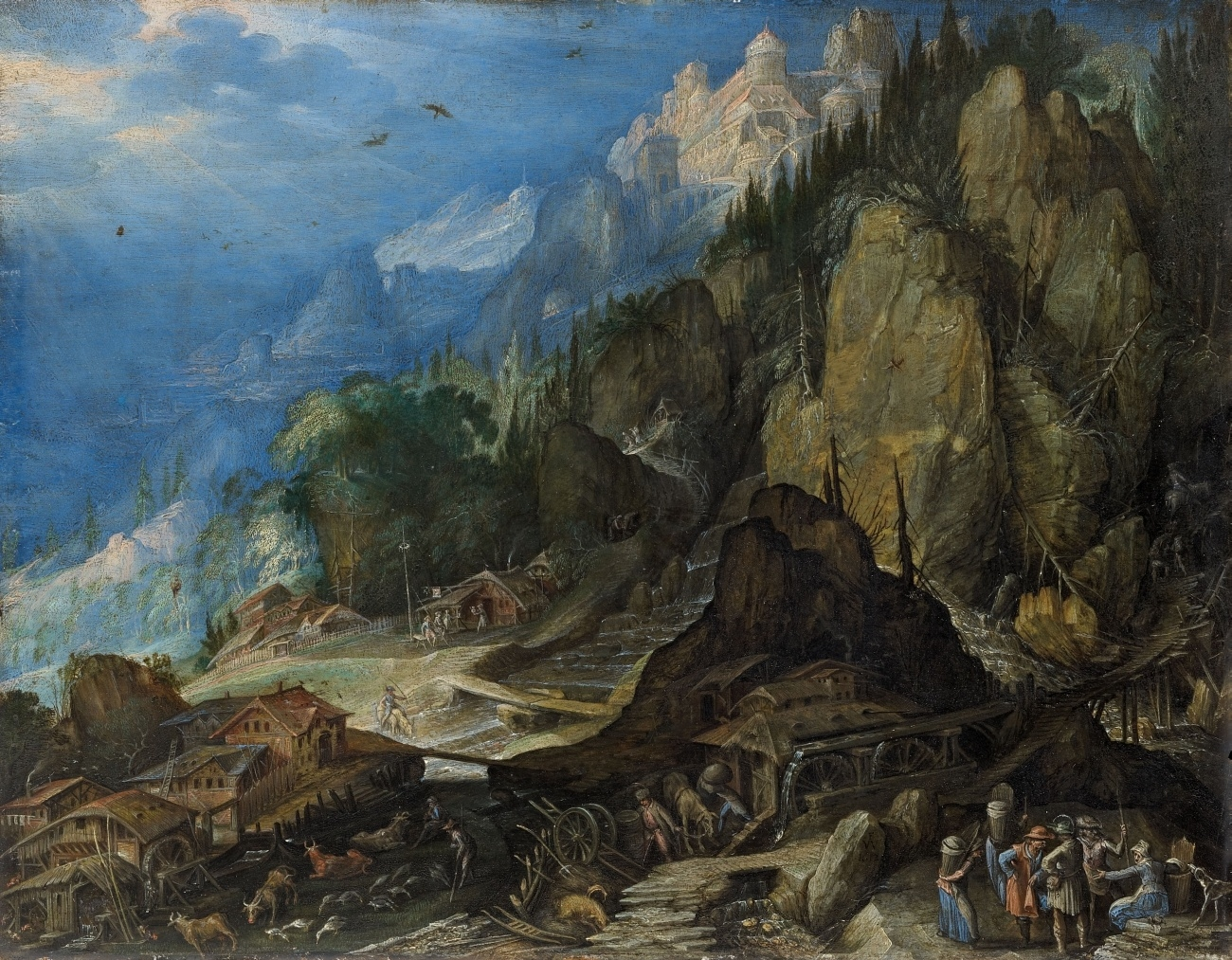 Gebirgslandschaft mit zwei Wassermühlen